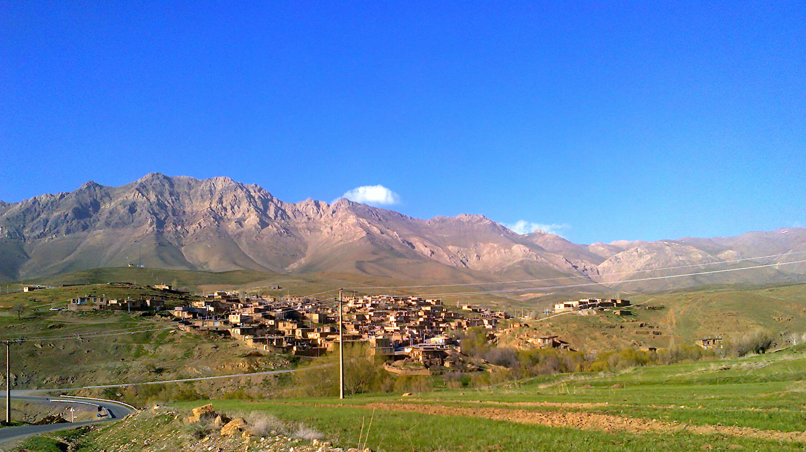 نهضت‌آباد، روستایی از توابع بخش مرکزی شهرستان فریدون‌شهر در استان اصفهان ایران است.